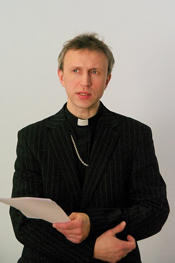 Mart Jaanson 17. märtsil 2011 EELK Valga praostkonna sinodil Sangaste seltsimajas ettekannet pidamas.